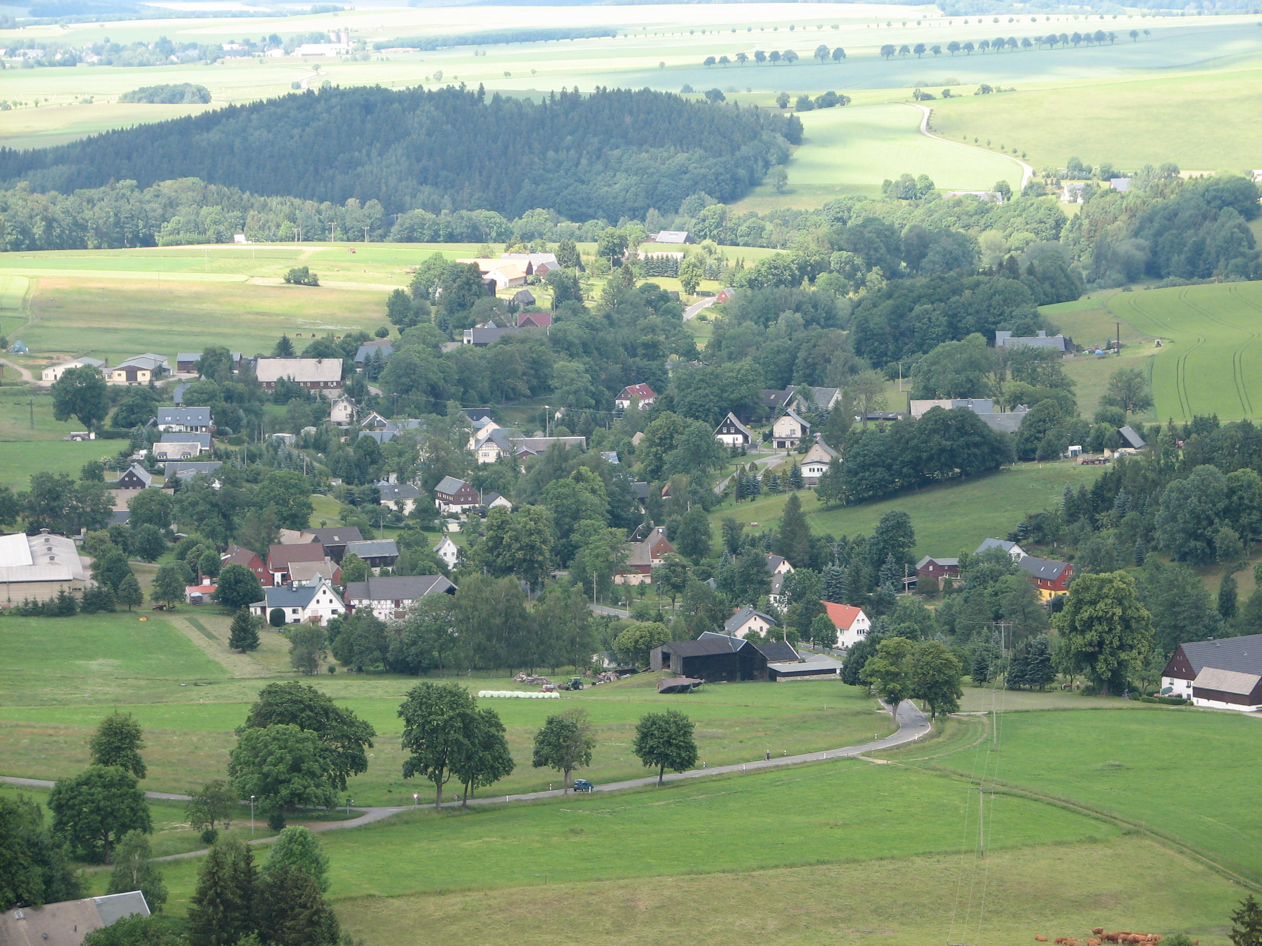 Blick auf Kleinbobritzsch von der Burg Frauenstein aus gesehen